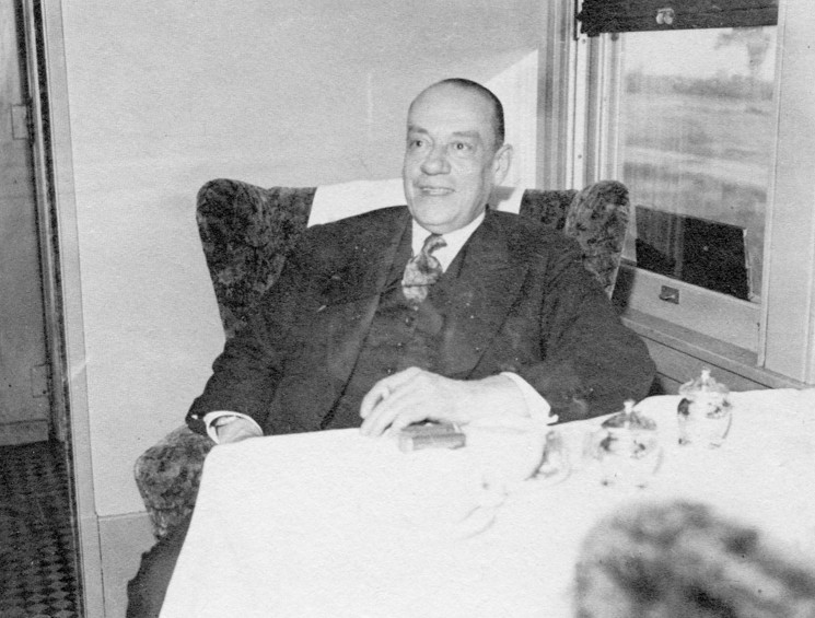 Camillien Houde in August, 1944